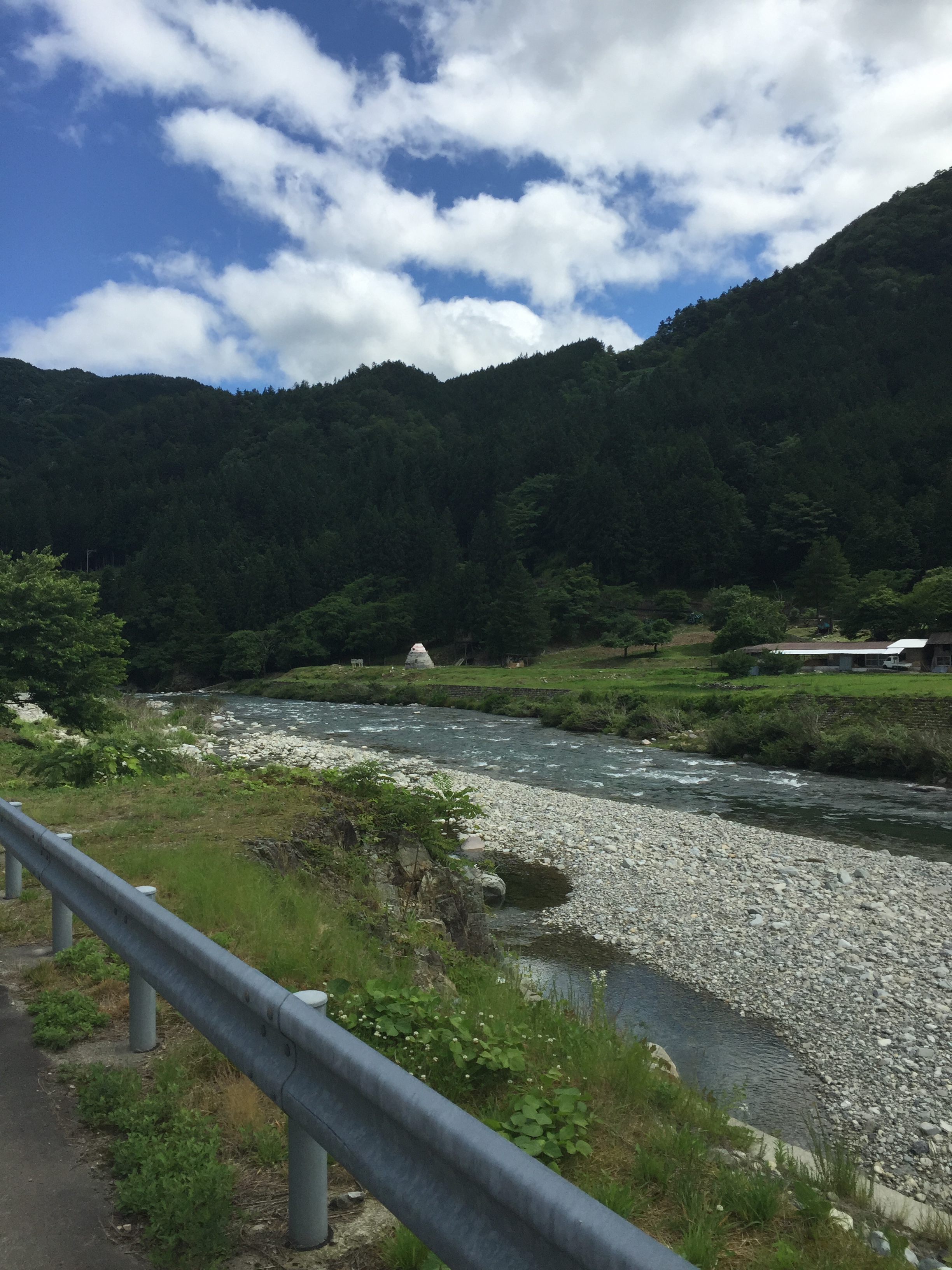 馬瀬川(下呂市馬瀬中切地内)